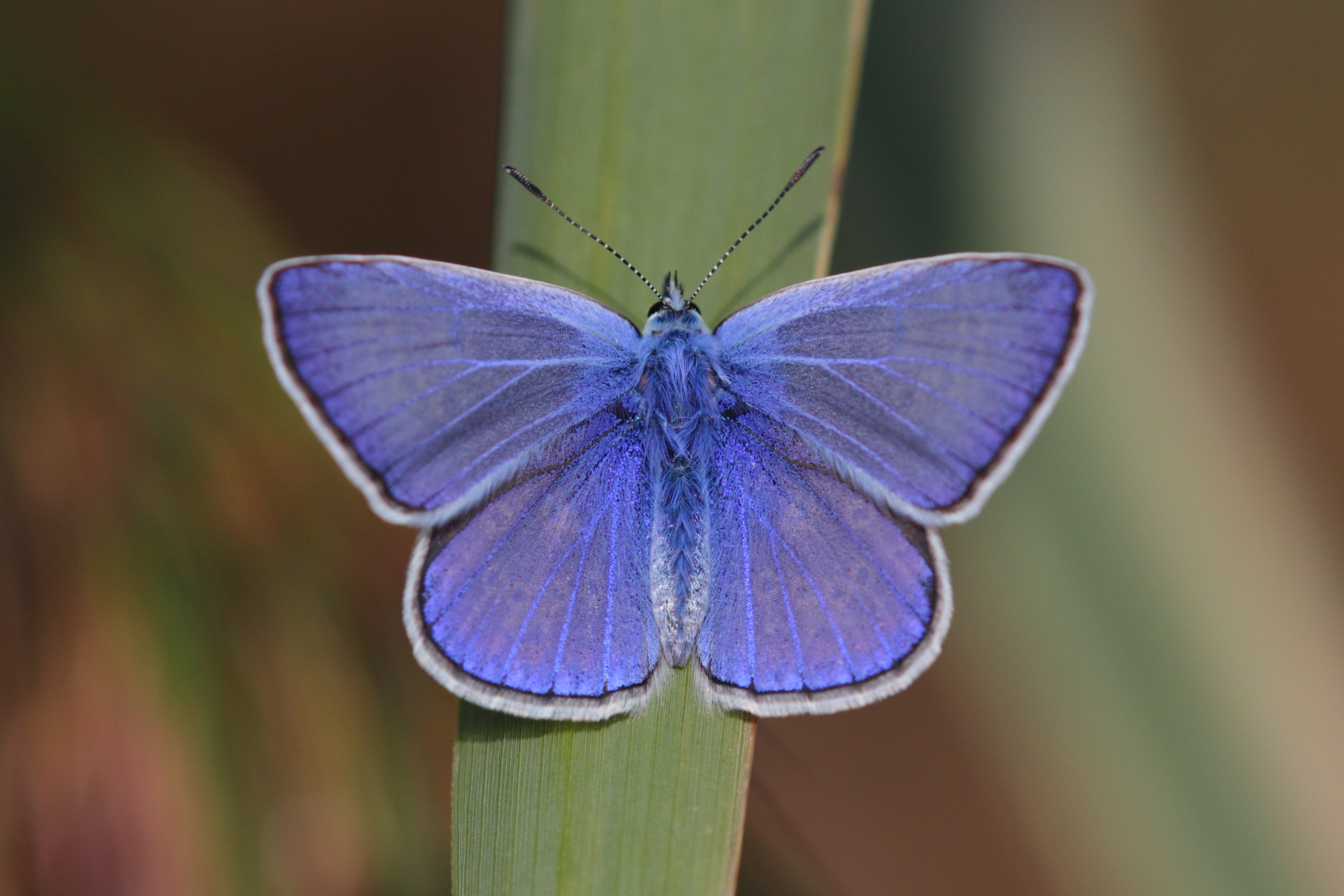 Ein Hauhechelbläuling Polyommatus icarus im Burgenland.